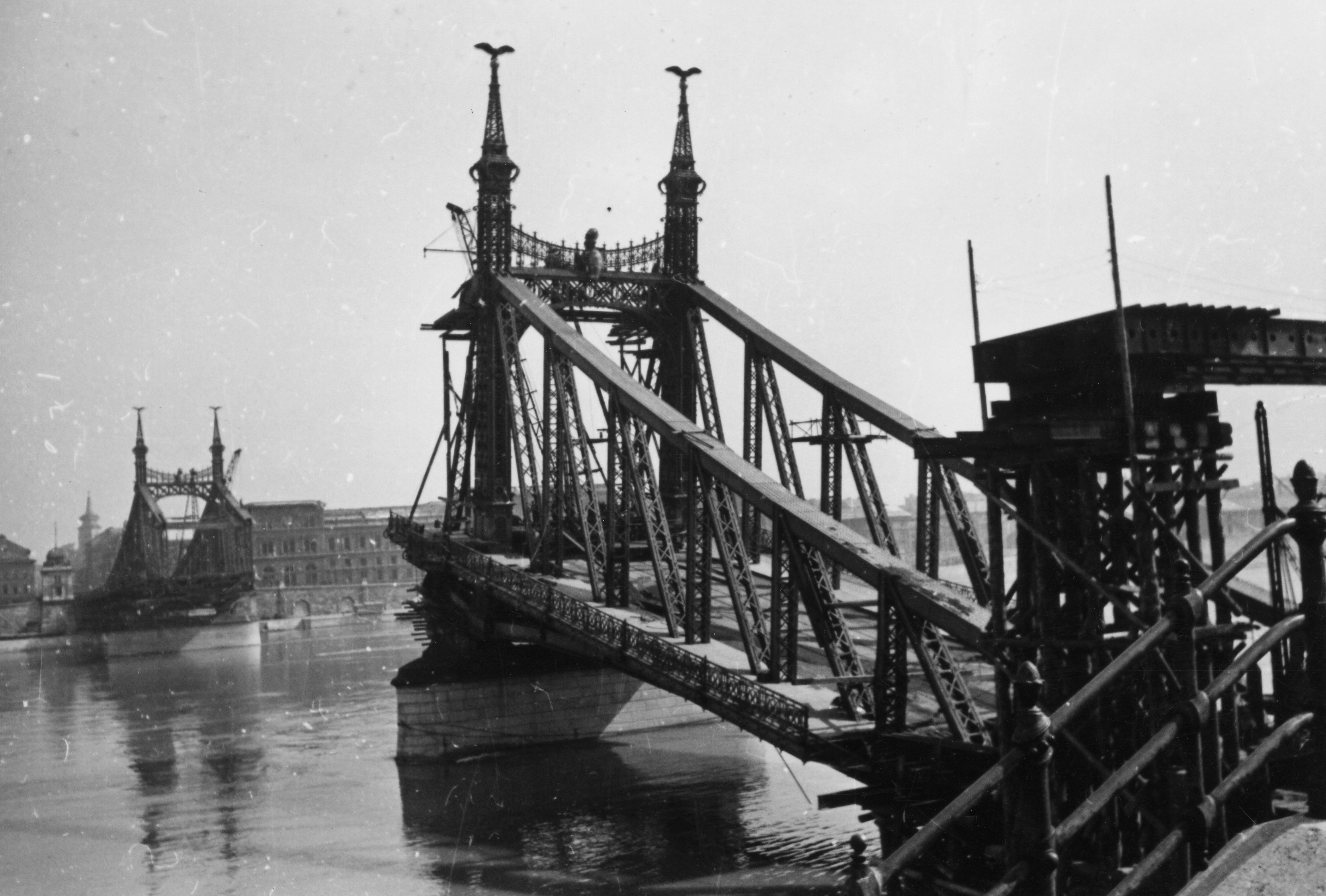 a lerombolt Szabadság híd helyreállítása a budai hídfőnél. Location: Hungary, Budapest XI. Tags: wrecked bridge, war damage, Budapest Title: a lerombolt Szabadság híd helyreállítása a budai hídfőnél.